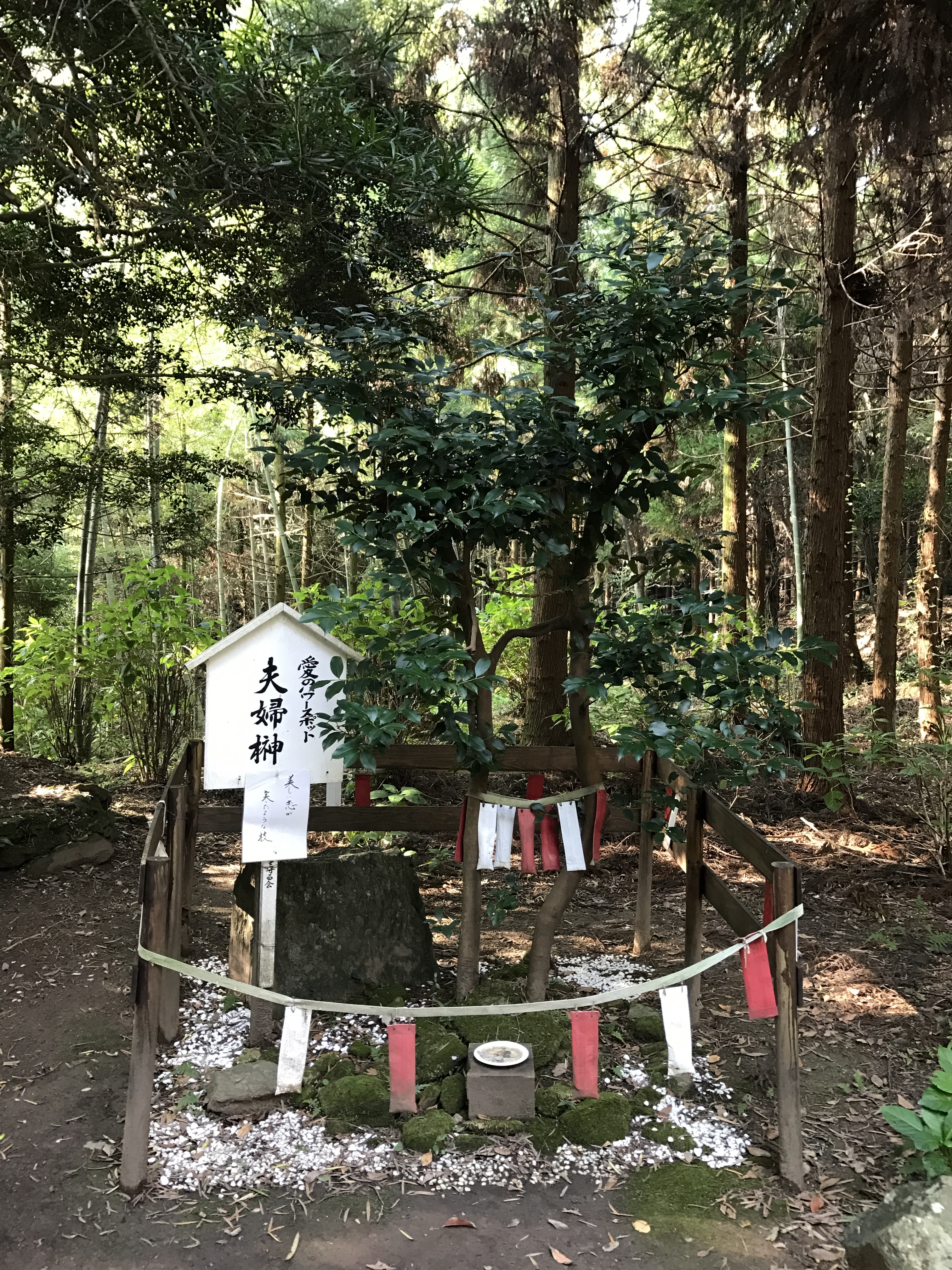 高良山の「夫婦榊」